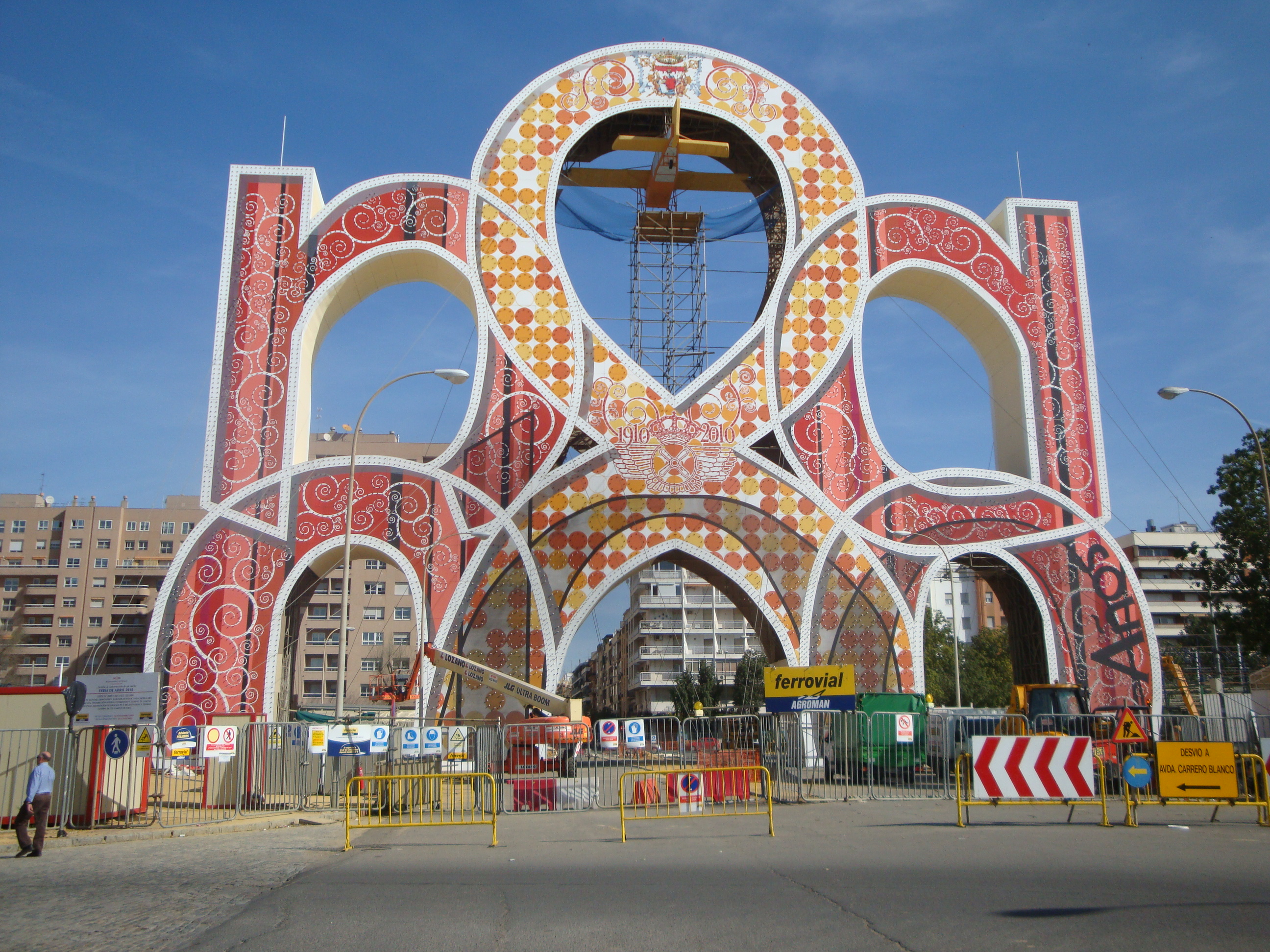 Portada Feria de Abril (2010) (en construcción). Sevilla